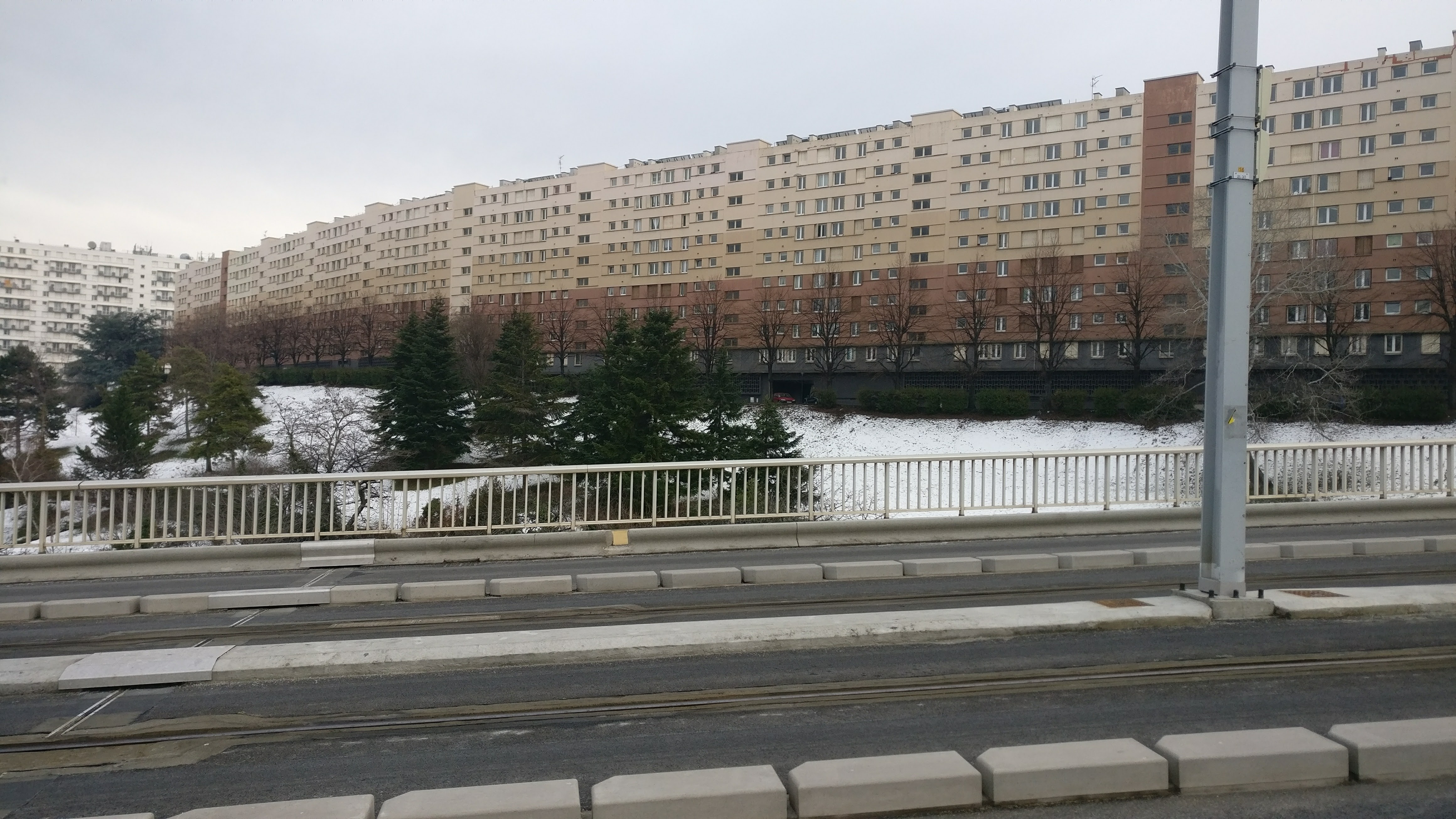 La "Muraille de Chine", grand HLM de Clermont-Ferrand, vue depuis le Viaduc Saint-Jacques.